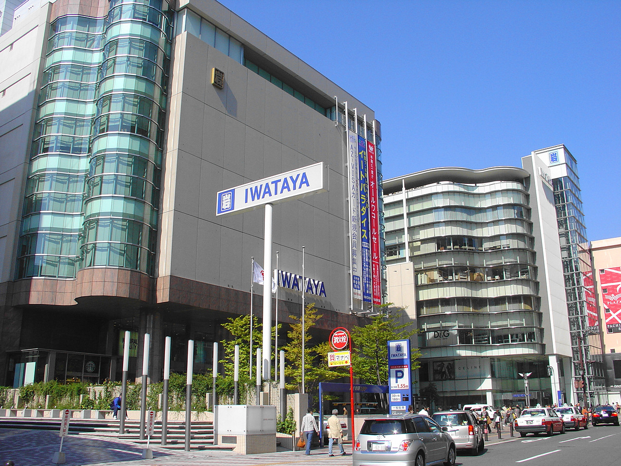 Iwataya, Tenjin Head Store.(Chuo Ward, Fukuoka City, Fukuoka Prefecture, Japan)